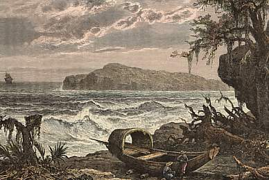 Gravure du XVIII° représentant l'ile de la tortue vue de l'embouchure des 3 rivières